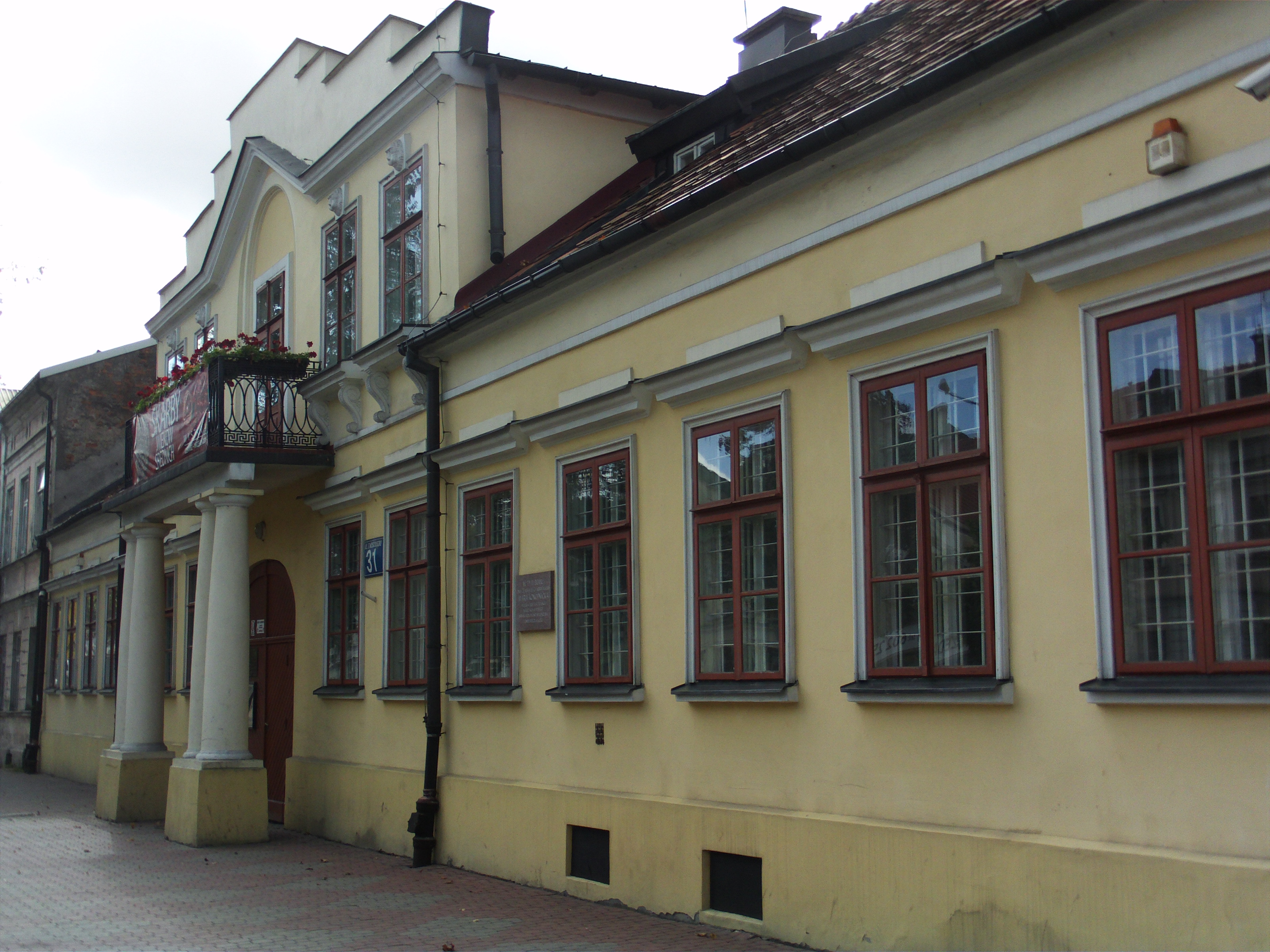 Suwałki ul. Kościuszki 31